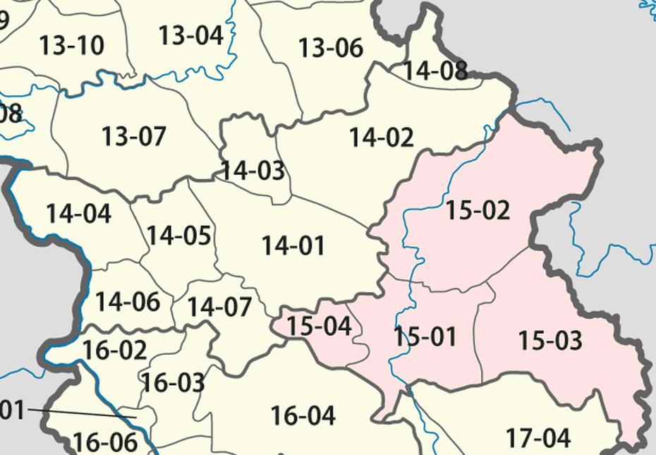 Giấy phép